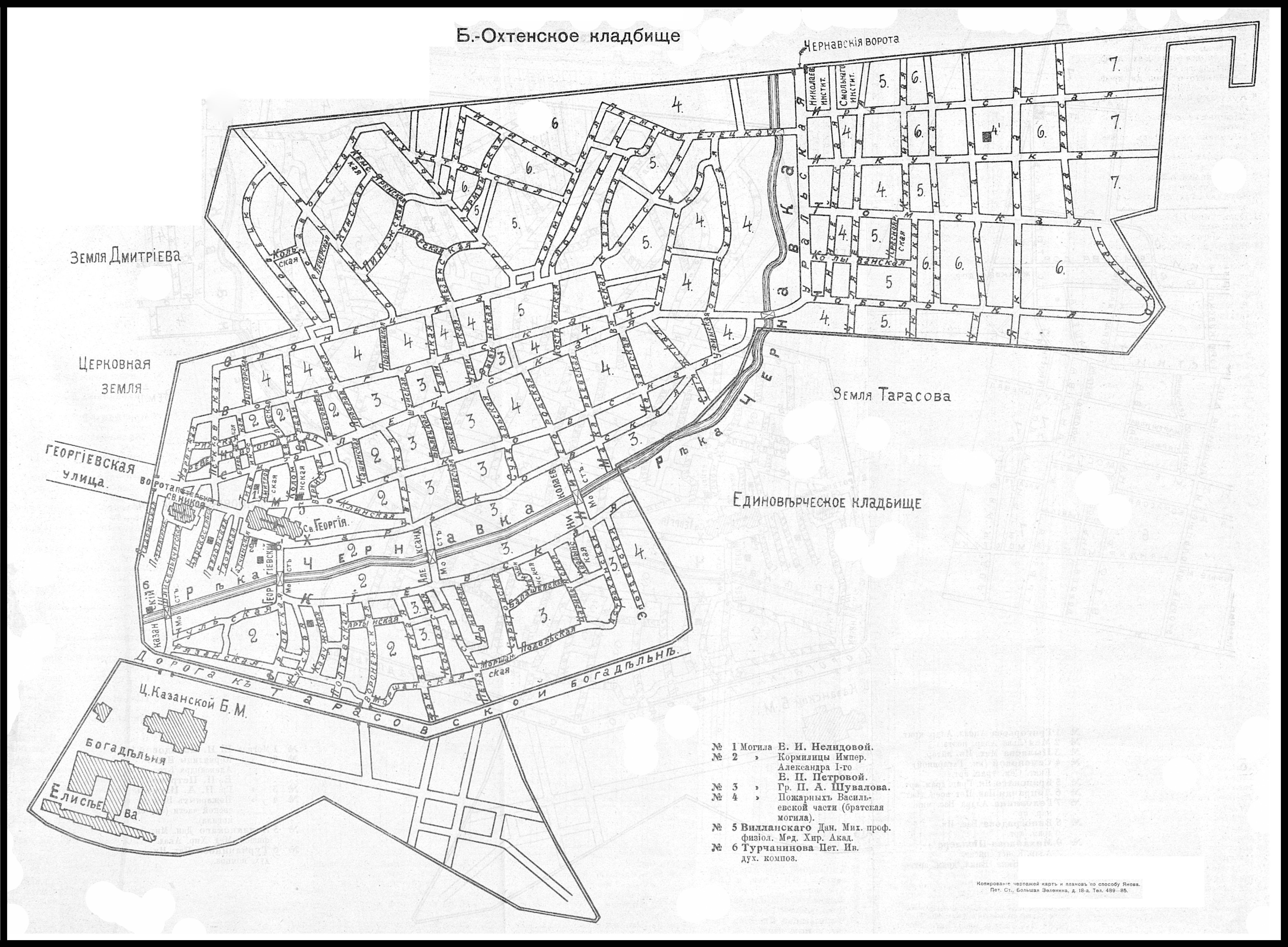 План Большеохтинского кладбища, 1914 год